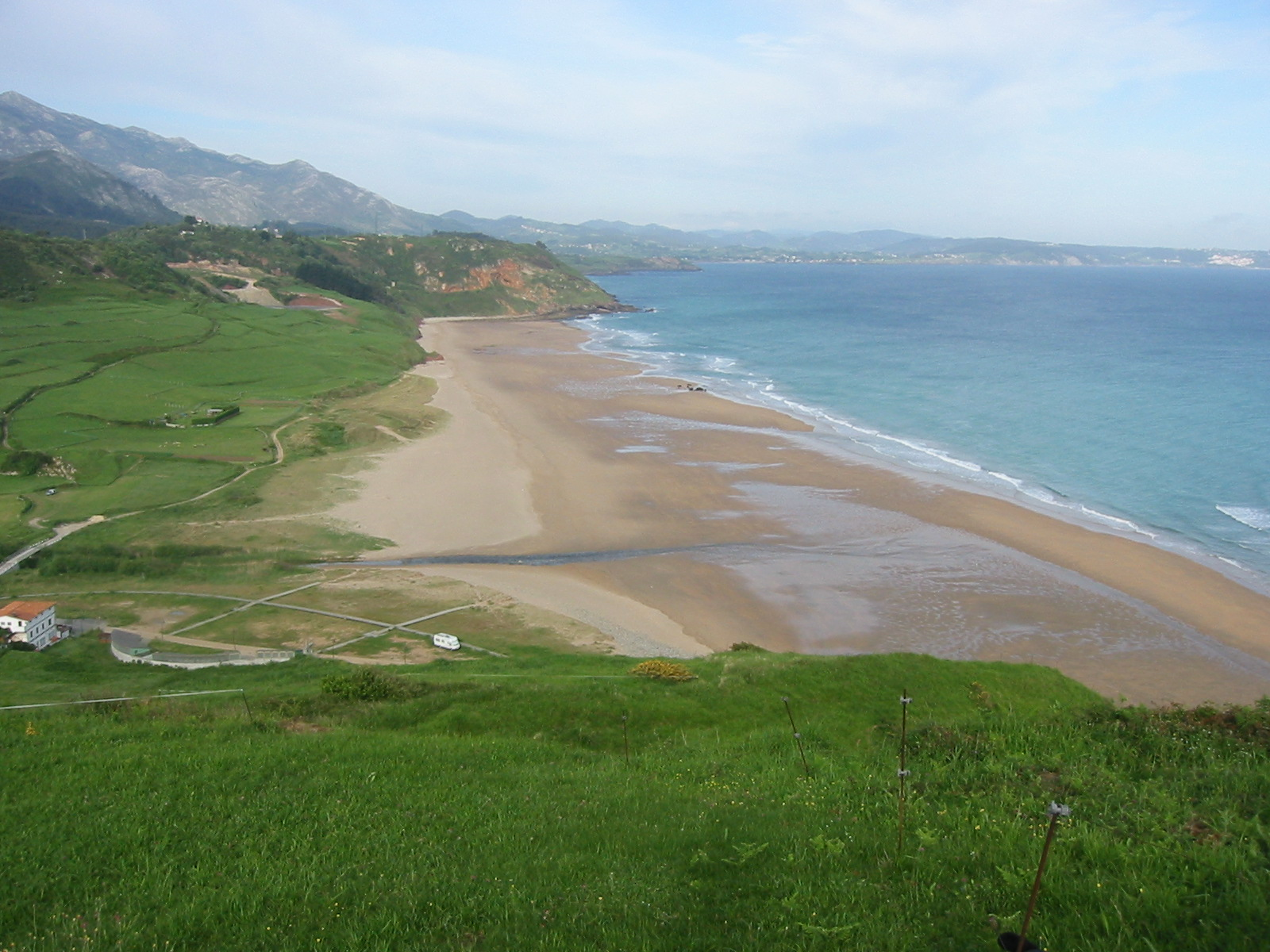 Blick vom Ferienhaus